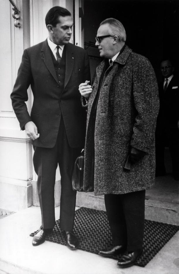 AR minister Prof. mr. P.J. Verdam (rechts) en Biesheuvel in gesprek. Den Haag, Nederland, 18 november 1966.